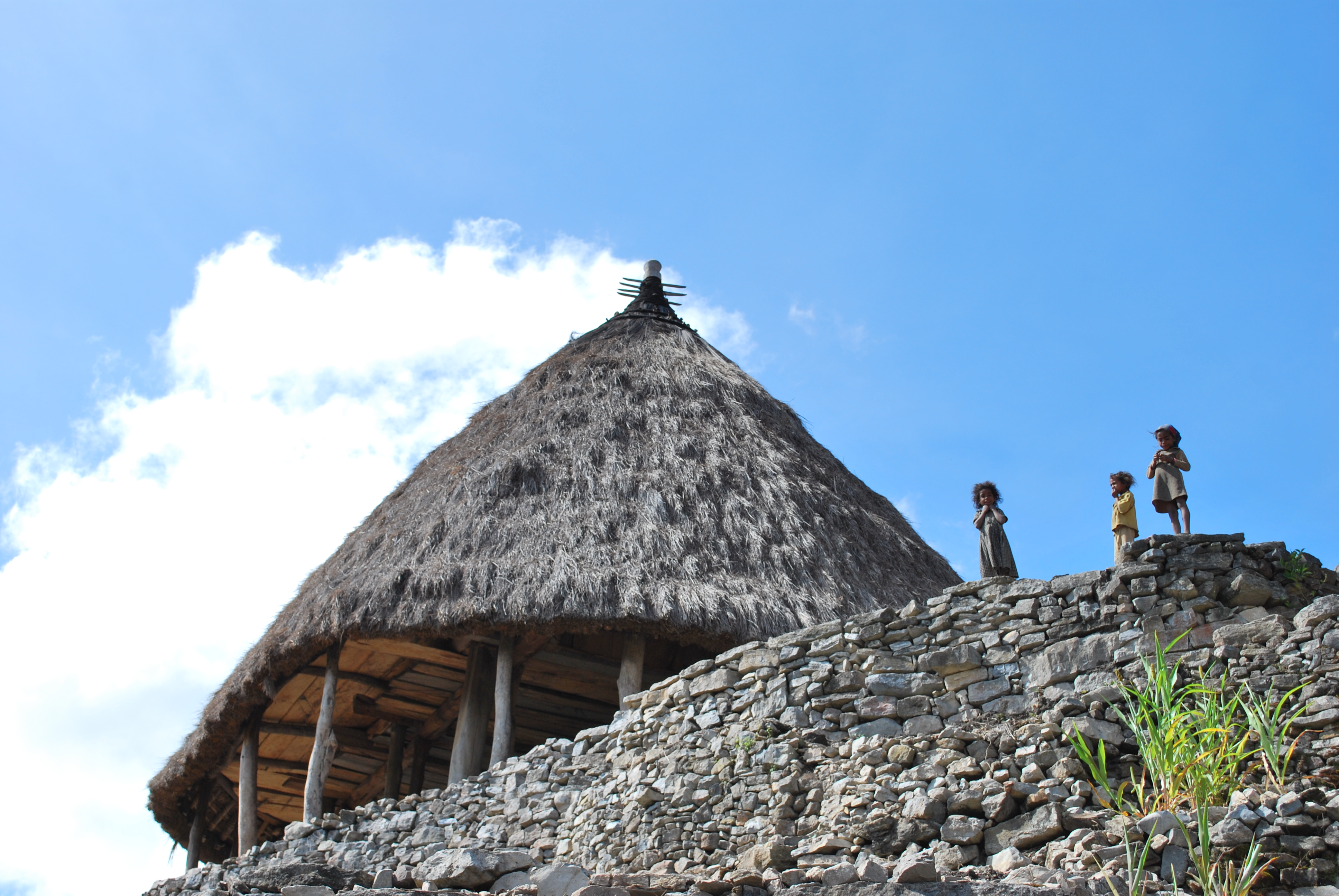 Hiut Lei, Maubisse